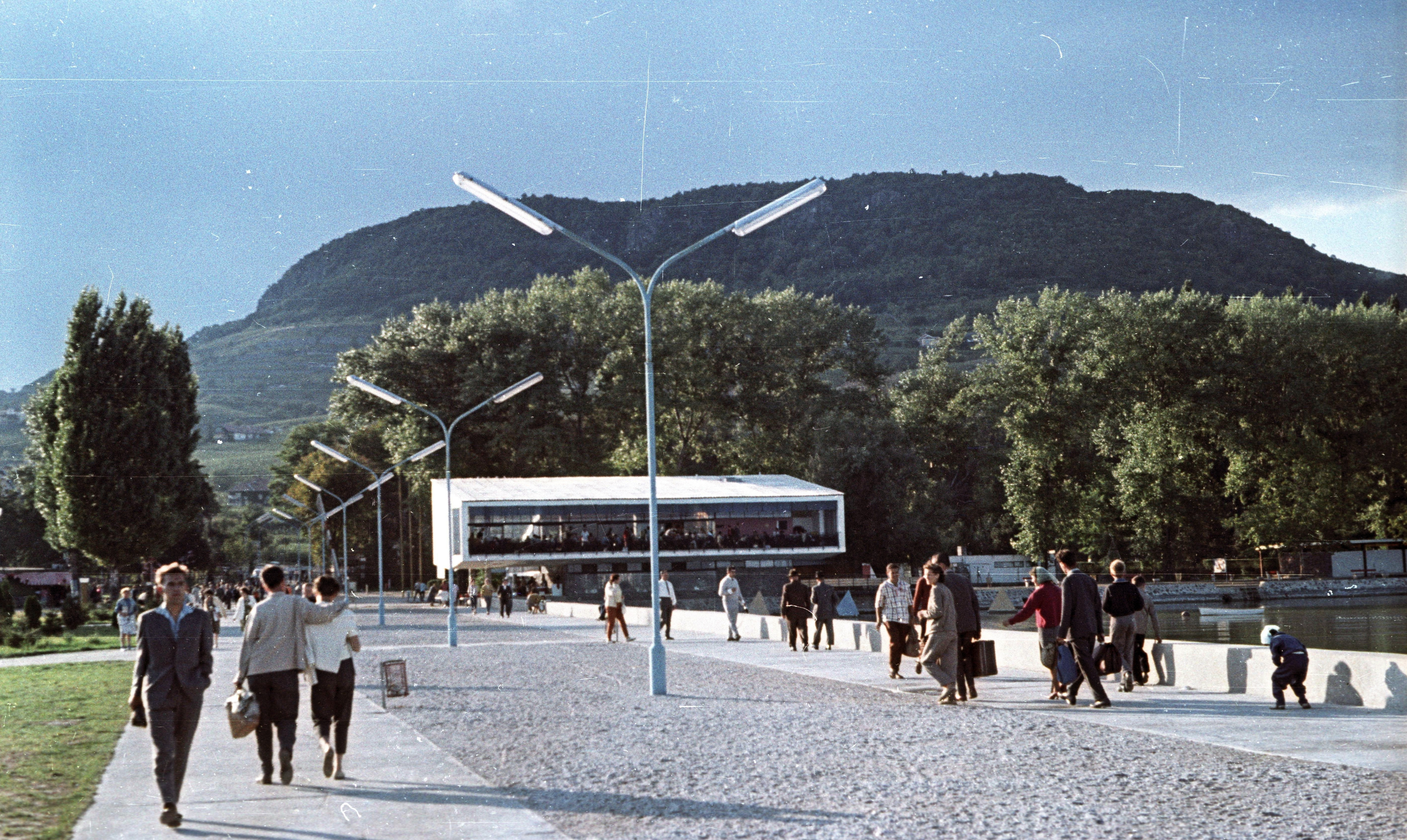 Tátika étterem (Callmeyer Ferenc, ép.:1962 máshol 1964). Location: Hungary, Badacsony Tags: colorful, modern architecture Title: hajóállomás.